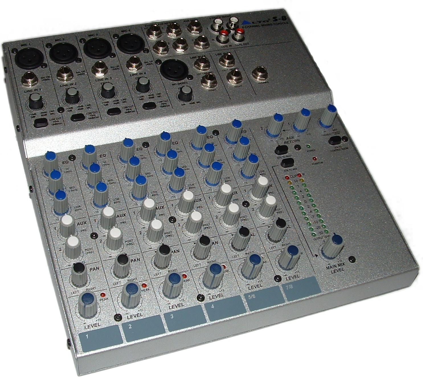 Alto S-8 mixer